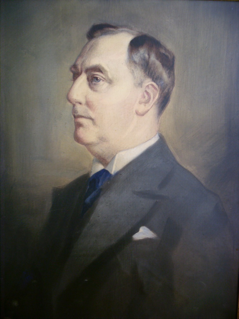 Porträtt av Gustaf Svedman